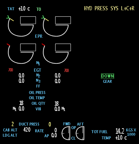 Example EICAS display.